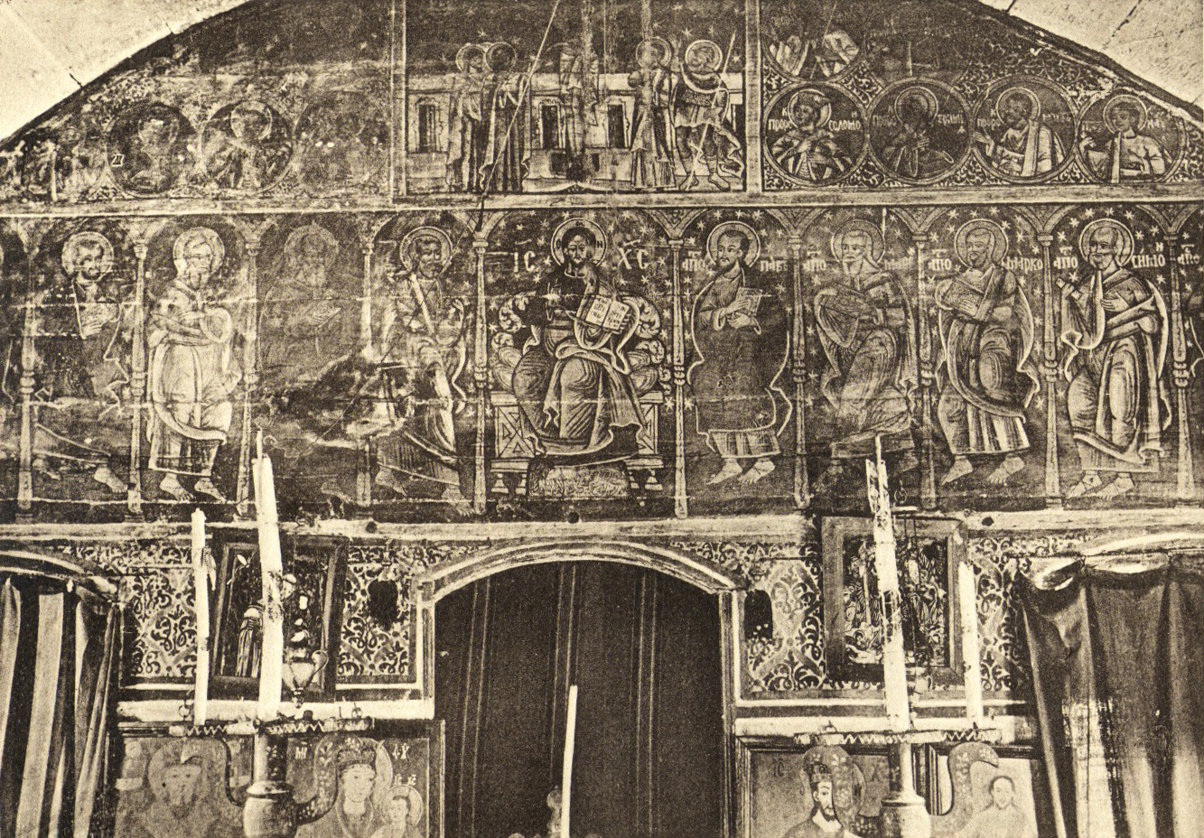 Iconostasul bisericii de lemn din Săliște, județul Arad